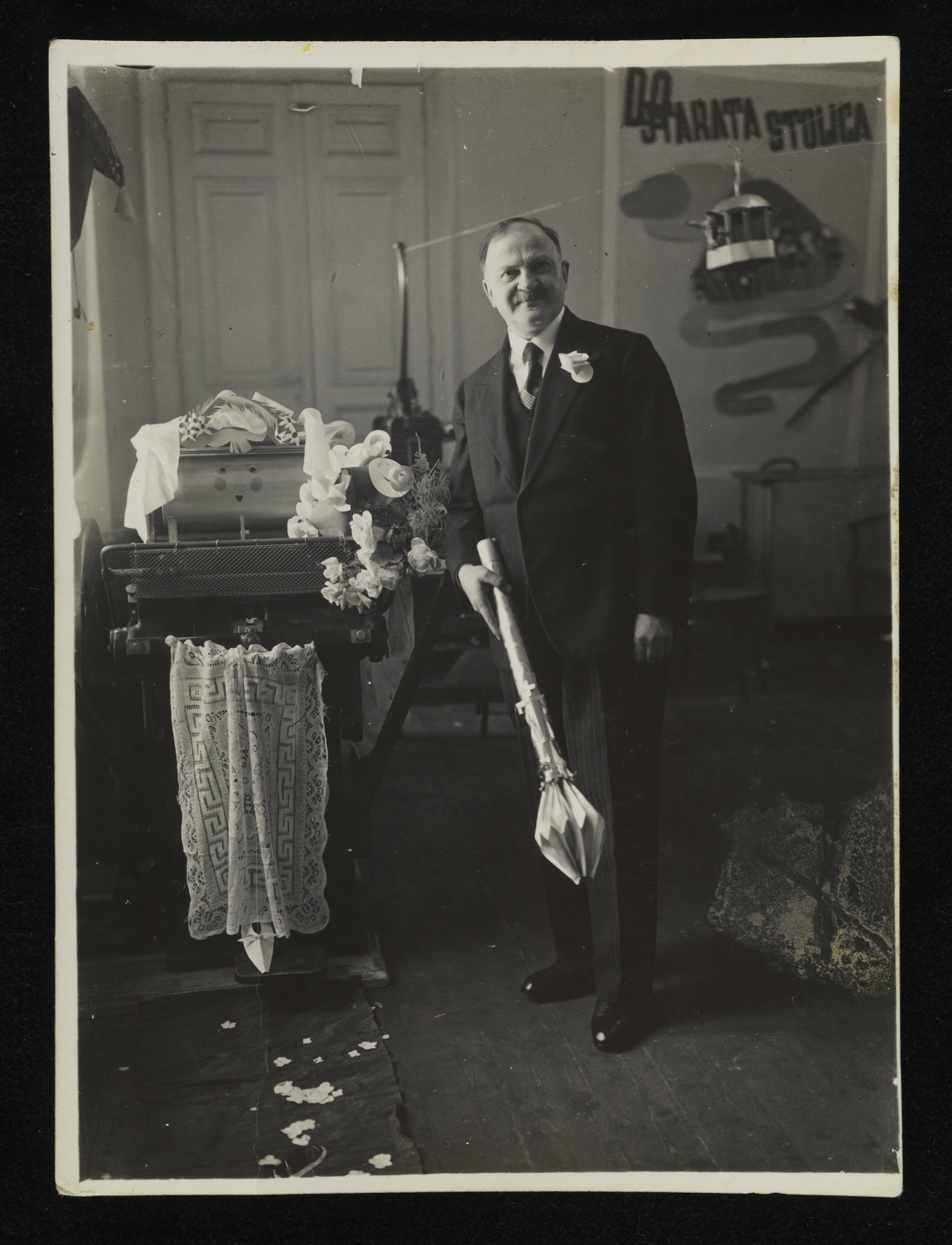 Edmund Bartłomiejczyk